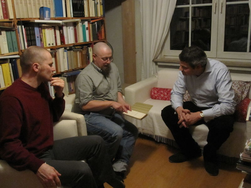 Frank Fischer (l.), André Seelmann (r.): Interview mit Tobias Wimbauer. Hagen-Berchum, 13. November 2010.